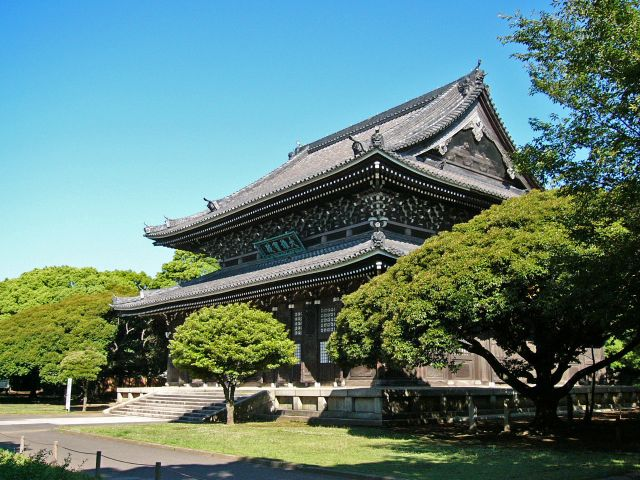 総持寺、仏殿（ぶつでん）